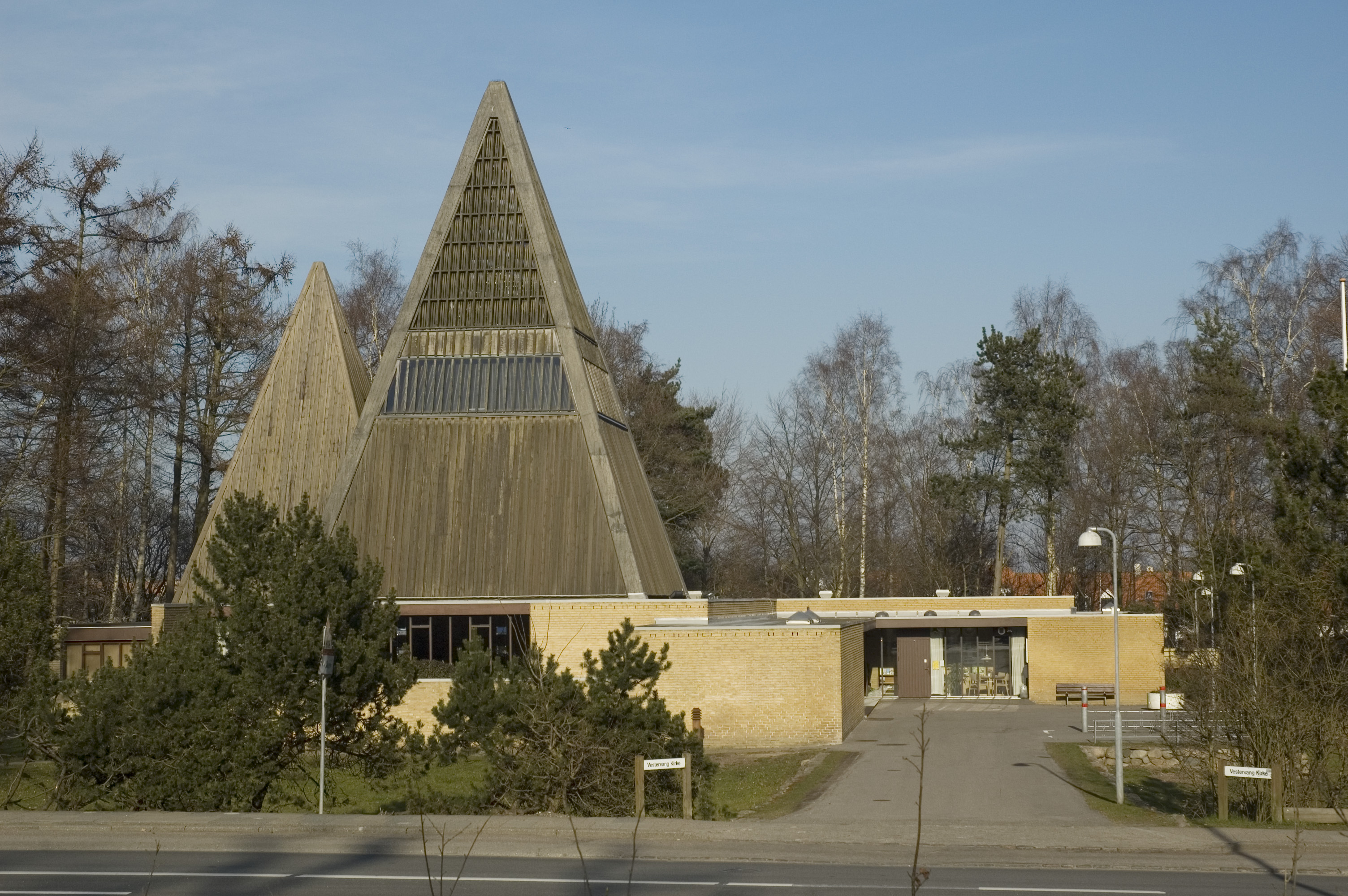 Vestervang Kirke, Helsingør stift